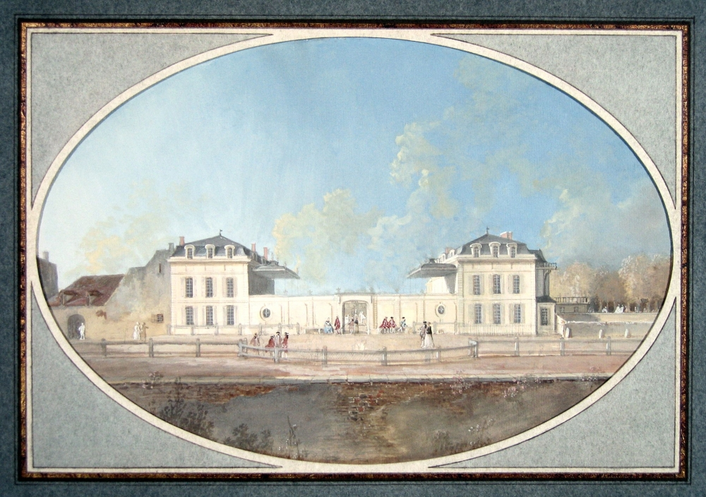 Vue de l'hôtel de Valentinois (côté cour)